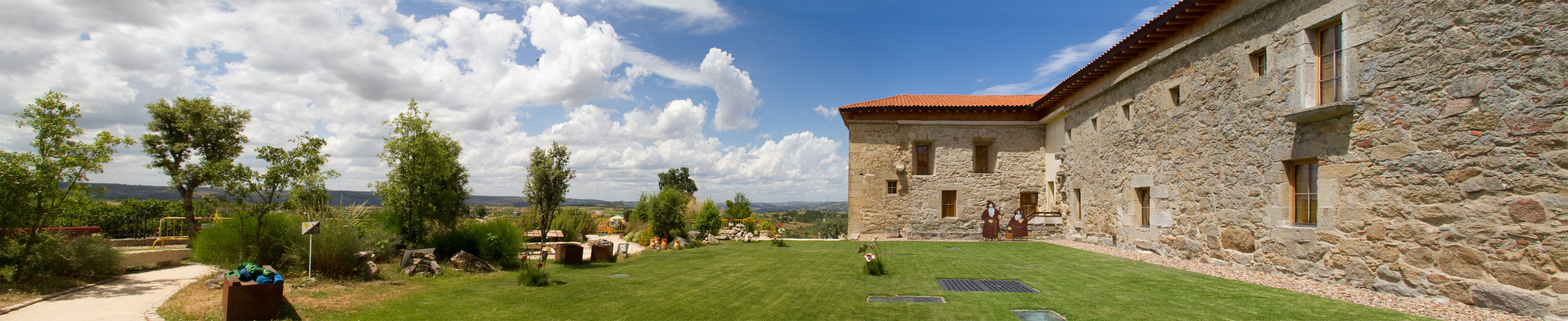 Vista panorámica del jardín de la Casa del Parque Natural de Arribes del Duero en Fermoselle, España.